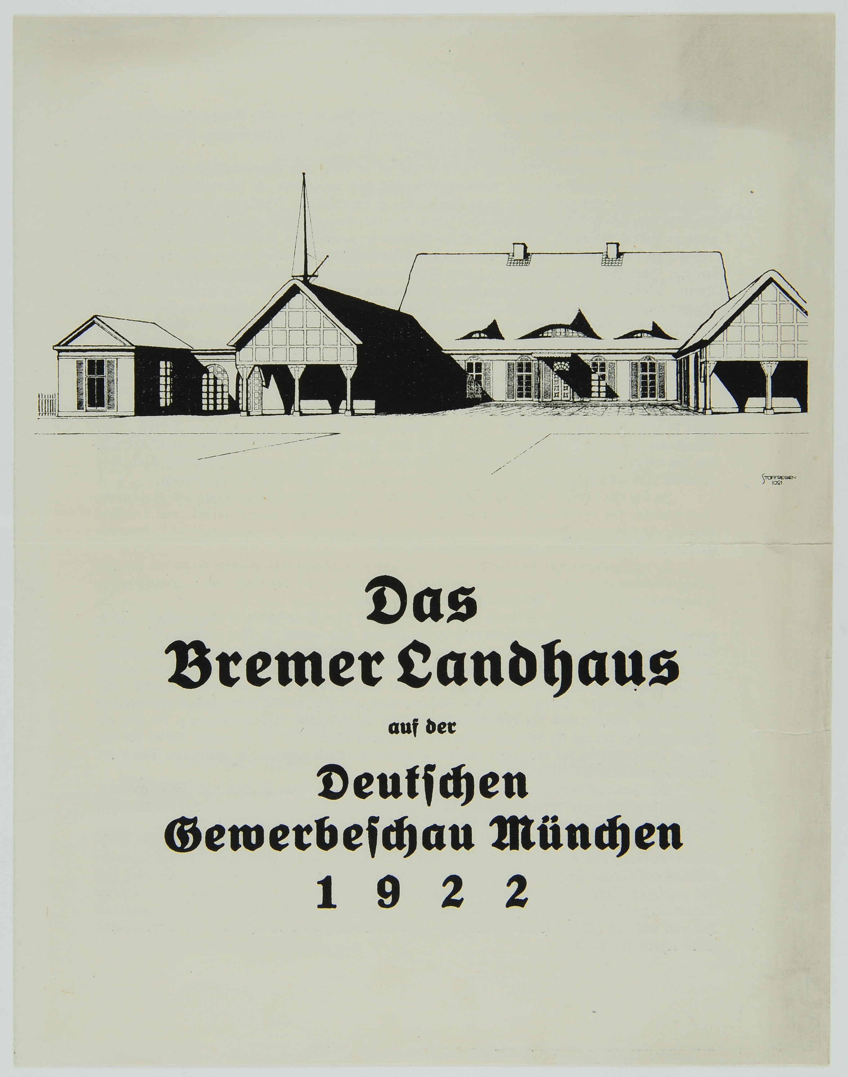 Illustrationen Bremer Landhaus (Blatt 1)